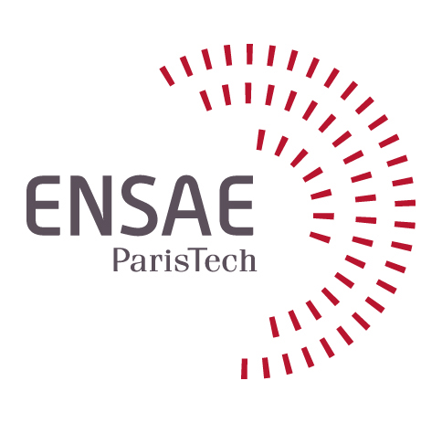 Logo Ensae Juin 2015